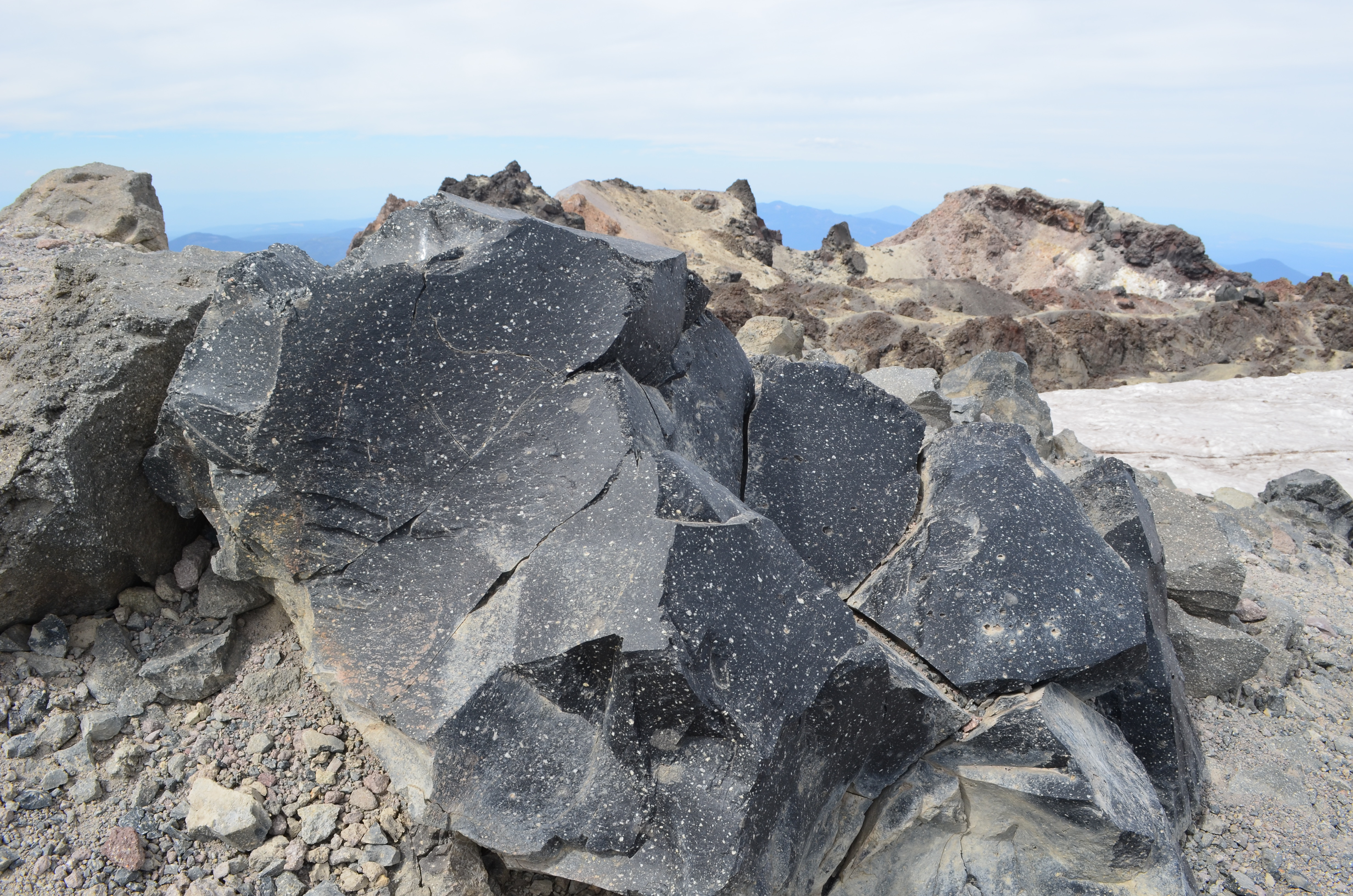 On Lassen Peak summit